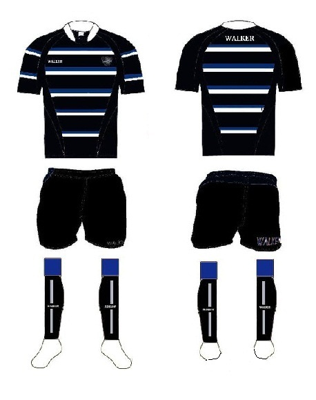 Jersey of San Miguel Hockey & Rugby Club.